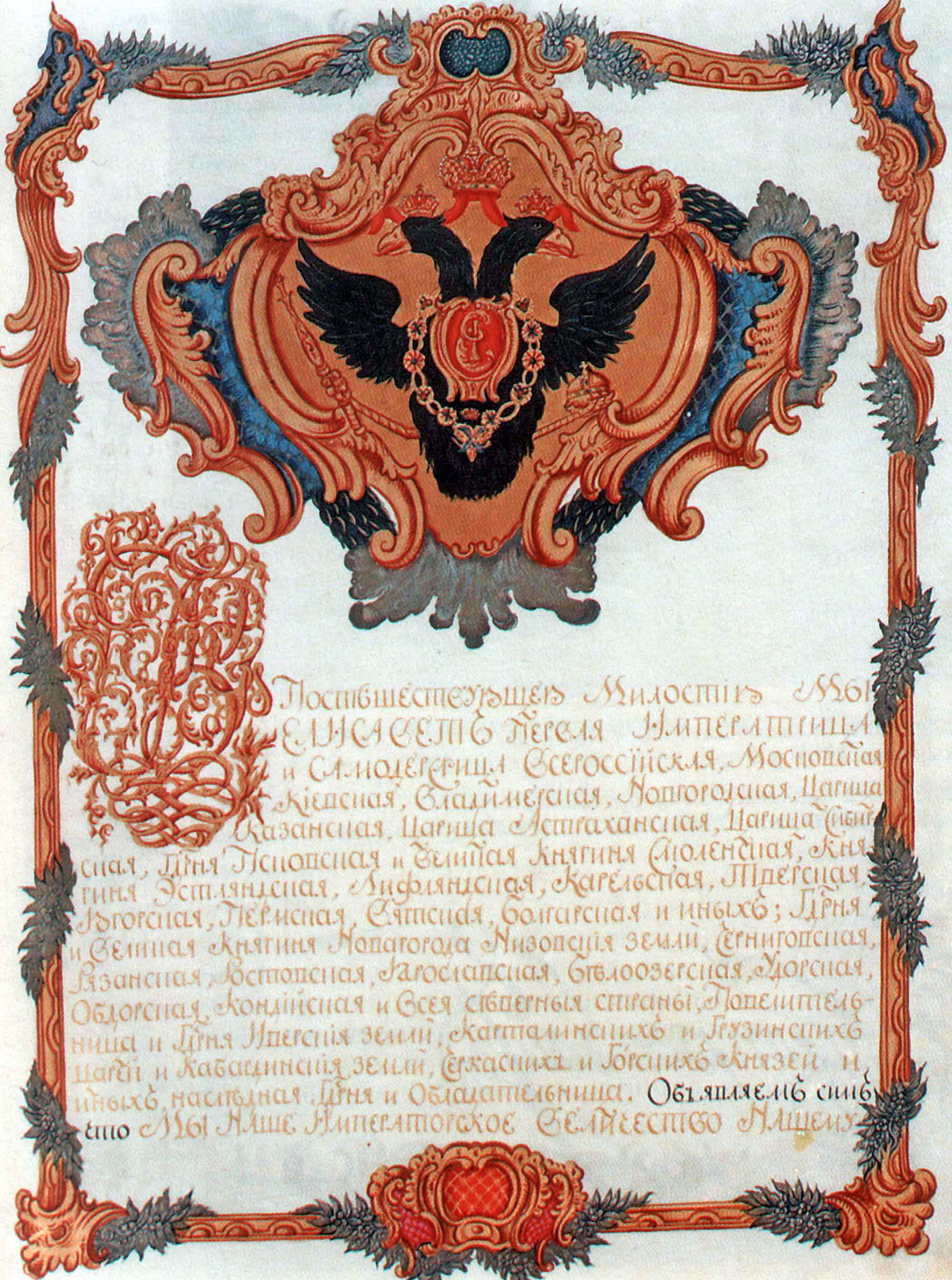 Donationsurkunde der russischen Kaiserin Elisabeth an den russ. Generalleutnant Balthasar Frhr. v. Campenhausen Datum: 27. Mai 1756 Urheber: Kaiserin Elisabeth von Russland Quelle: Katalog "Gutshof unter Eichen", Herder Institut